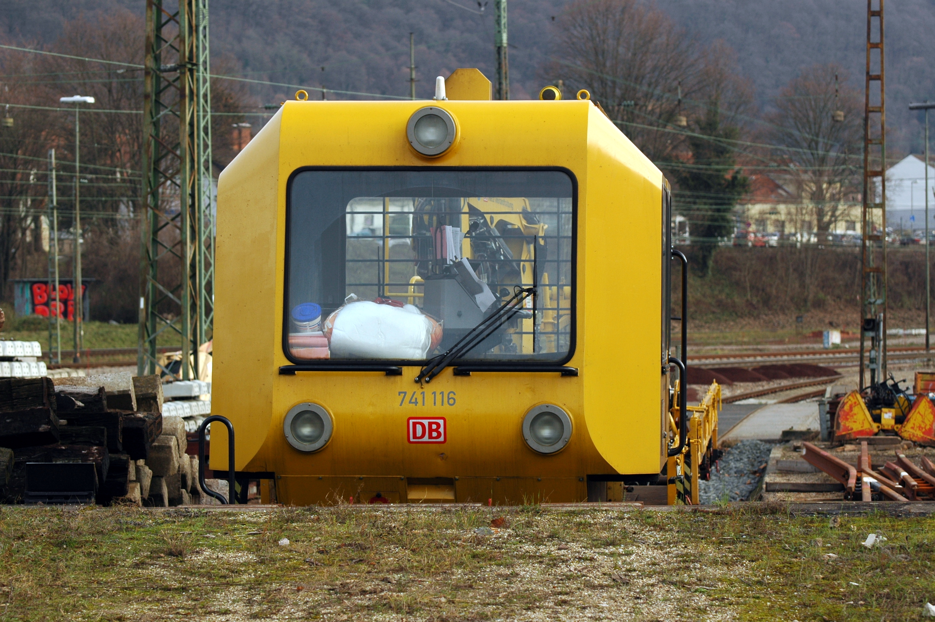 Heidelberg - Arbeits- Sonderlfahrzeug - Baureihe 741